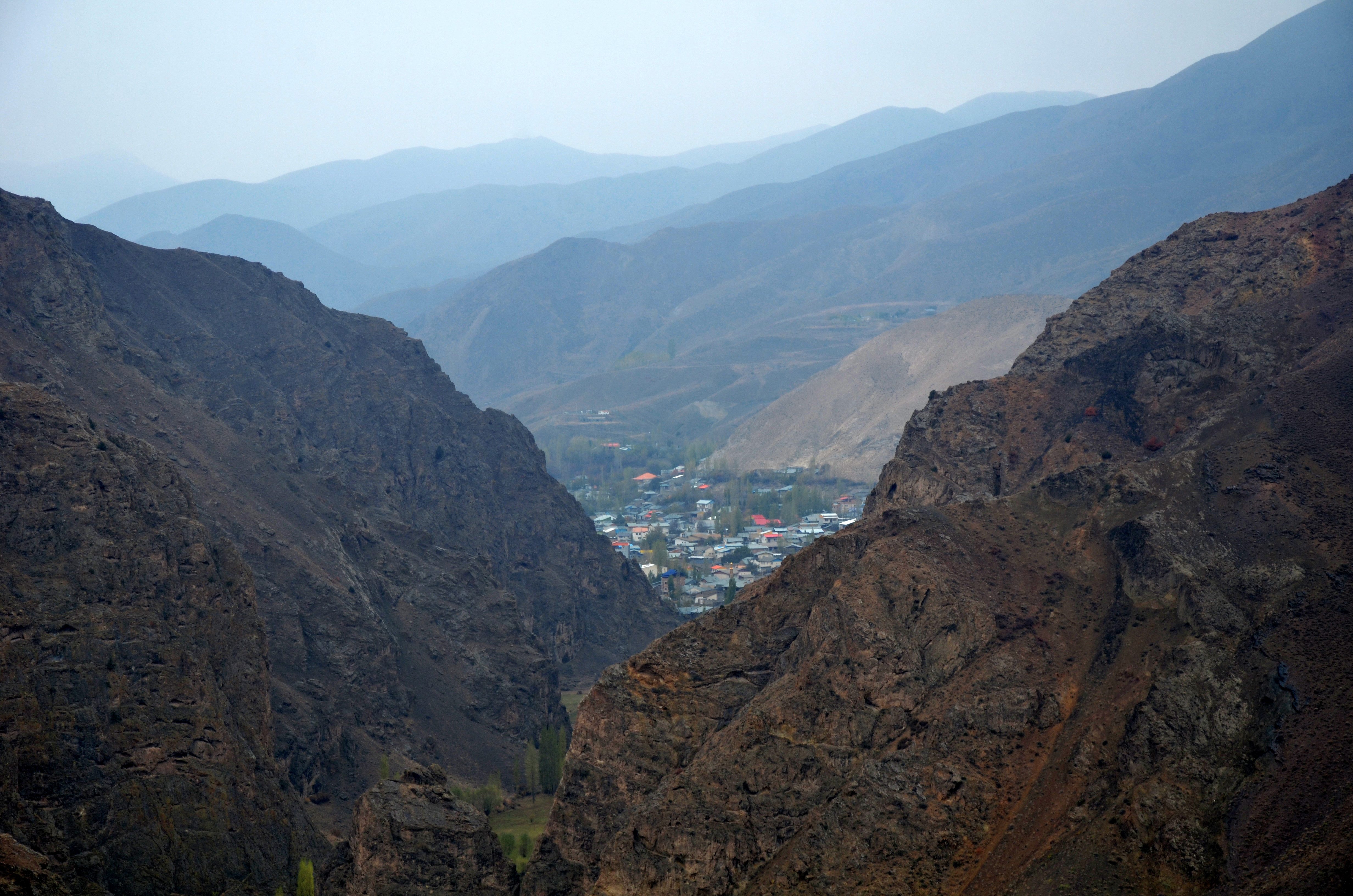 Mazandaran - Baladeh